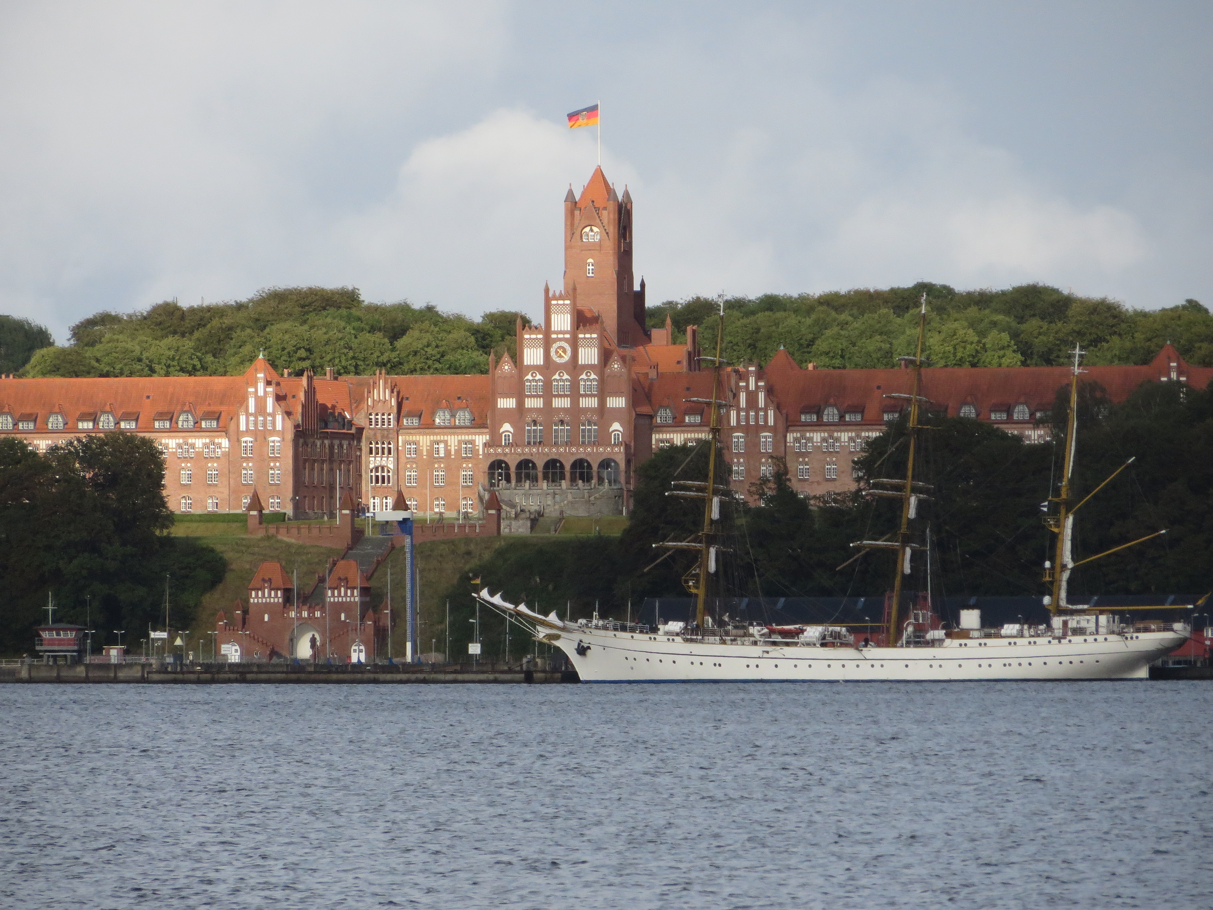 Die Marineschule Mürwik mit dem Segelschulschiff Gorch Fock, Flensburger Förde (Flensburg-Mürwik Juli 2015)